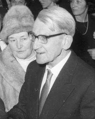 in der Medizinischen Universitätsklinik. Im Bild u.a. der emeritierte Professor für Innere Medizin der Christian-Albrechts-Universität (CAU) Prof. Dr. Helmuth Reinwein (Bildmitte).